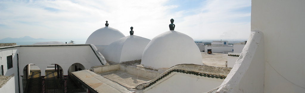 Toit de la mosquée principale de Sidi Bou Saïd